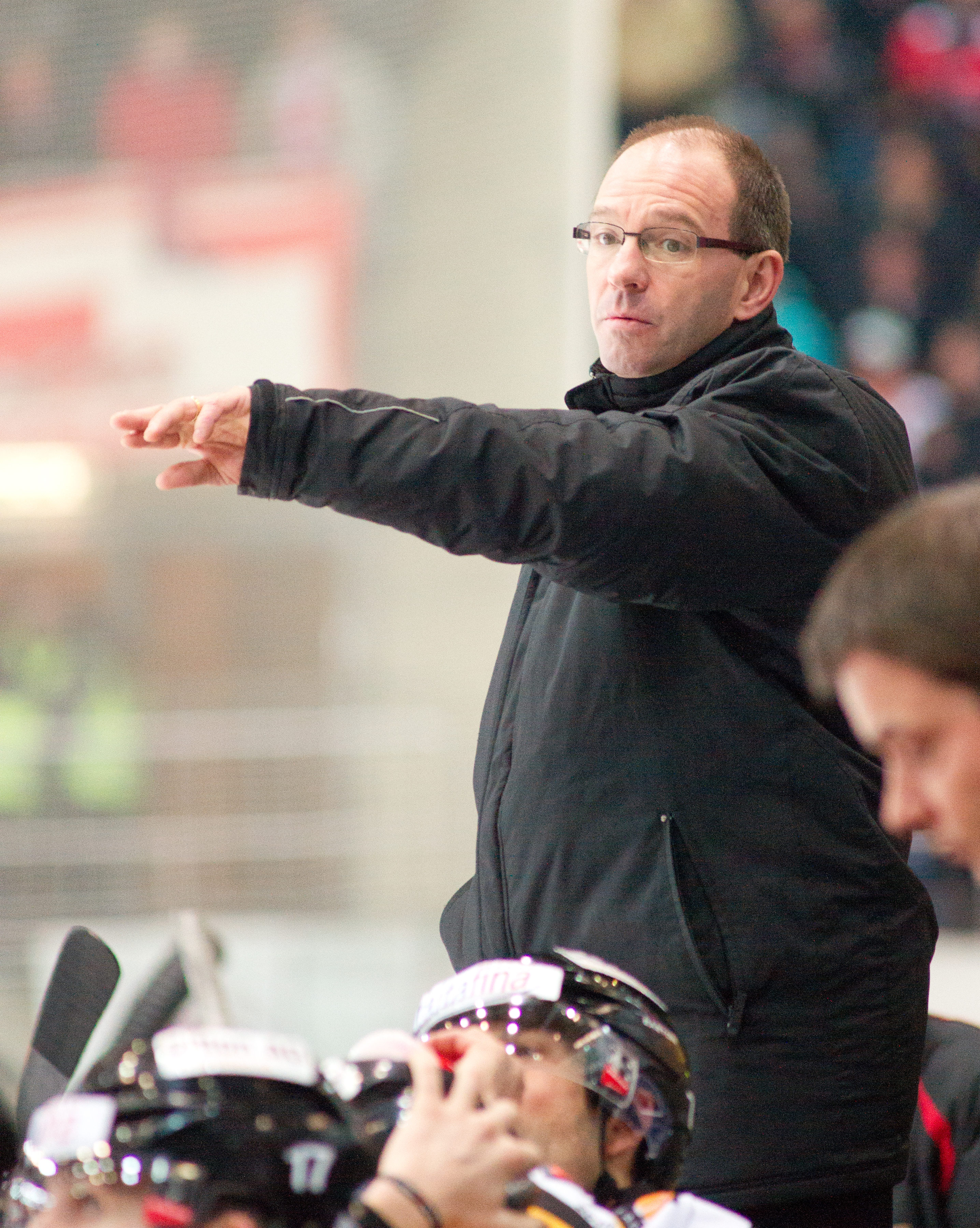 Dany Gelinas entraineur du John HC Bale.